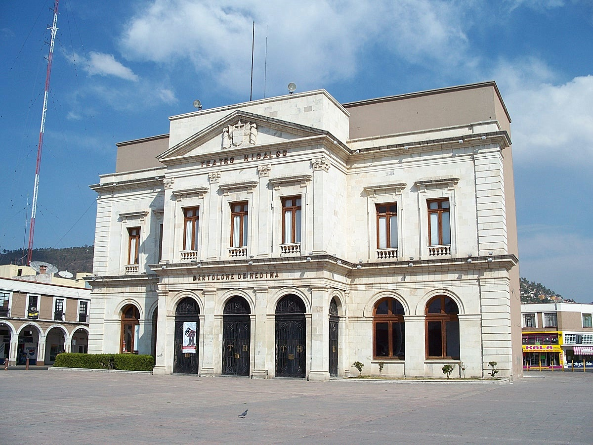 Teatro Bartolomé de Medina, Pachuca, Mexico